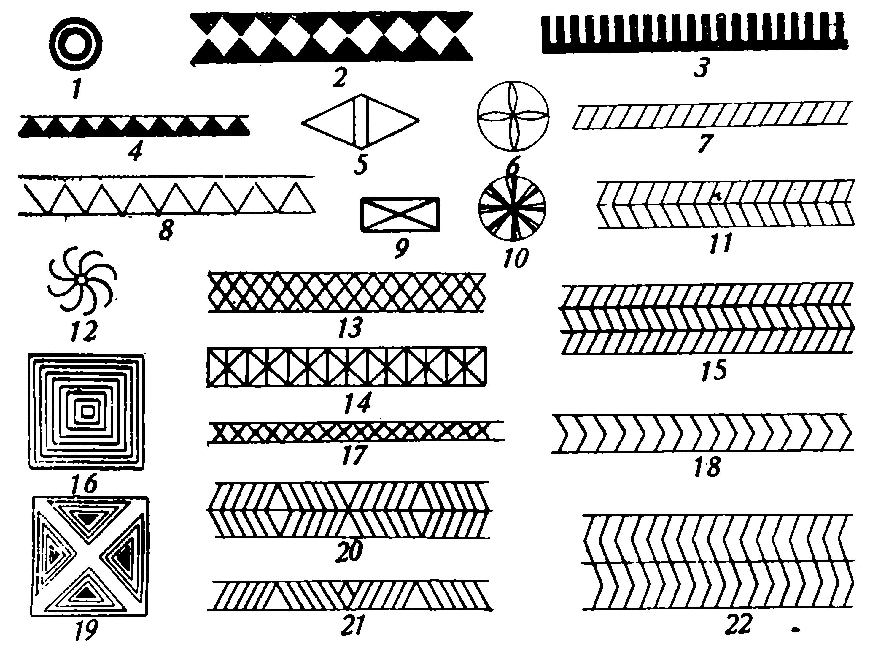 Первый орнаментальный комплекс включает простейшие геометрические фигуры: треугольники (2,4), зигзаги (8), полосы из линий (3,7,20,21), ёлочки (11,15) , шевроны (18,22), косую сетку (13), крестики (17), квадраты и четырёхугольники с диагональными линиями и вписанными фигурами (16,19,9,14), ромбы (5), круги (1,6,10), вихревые розетки (12)